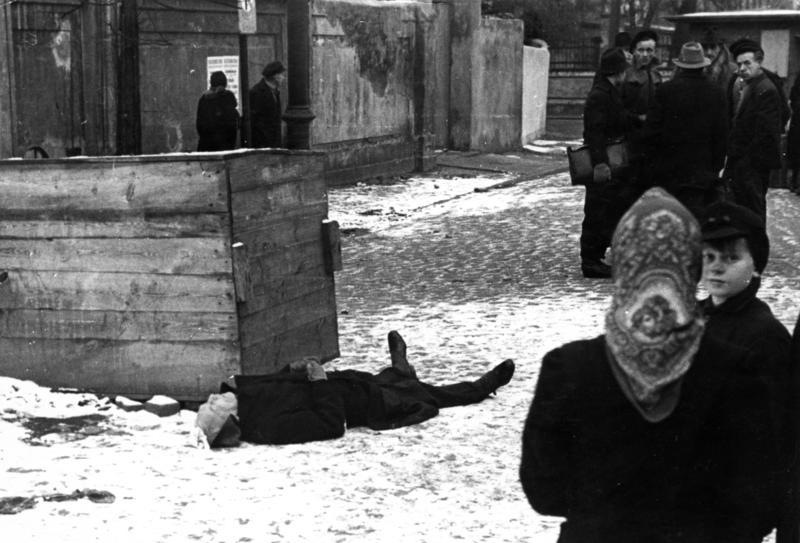 Hungerwinter, zusammengebrochener Mann Illus-Stachelscheid Angestellter des Arbeitsamtes Jos. Peil aus Düsseldorf Rath brach an der Haltestelle der Linie 12 plötzlich zusammen. Ca. 50 Jahre. (1948) 1408 - 48